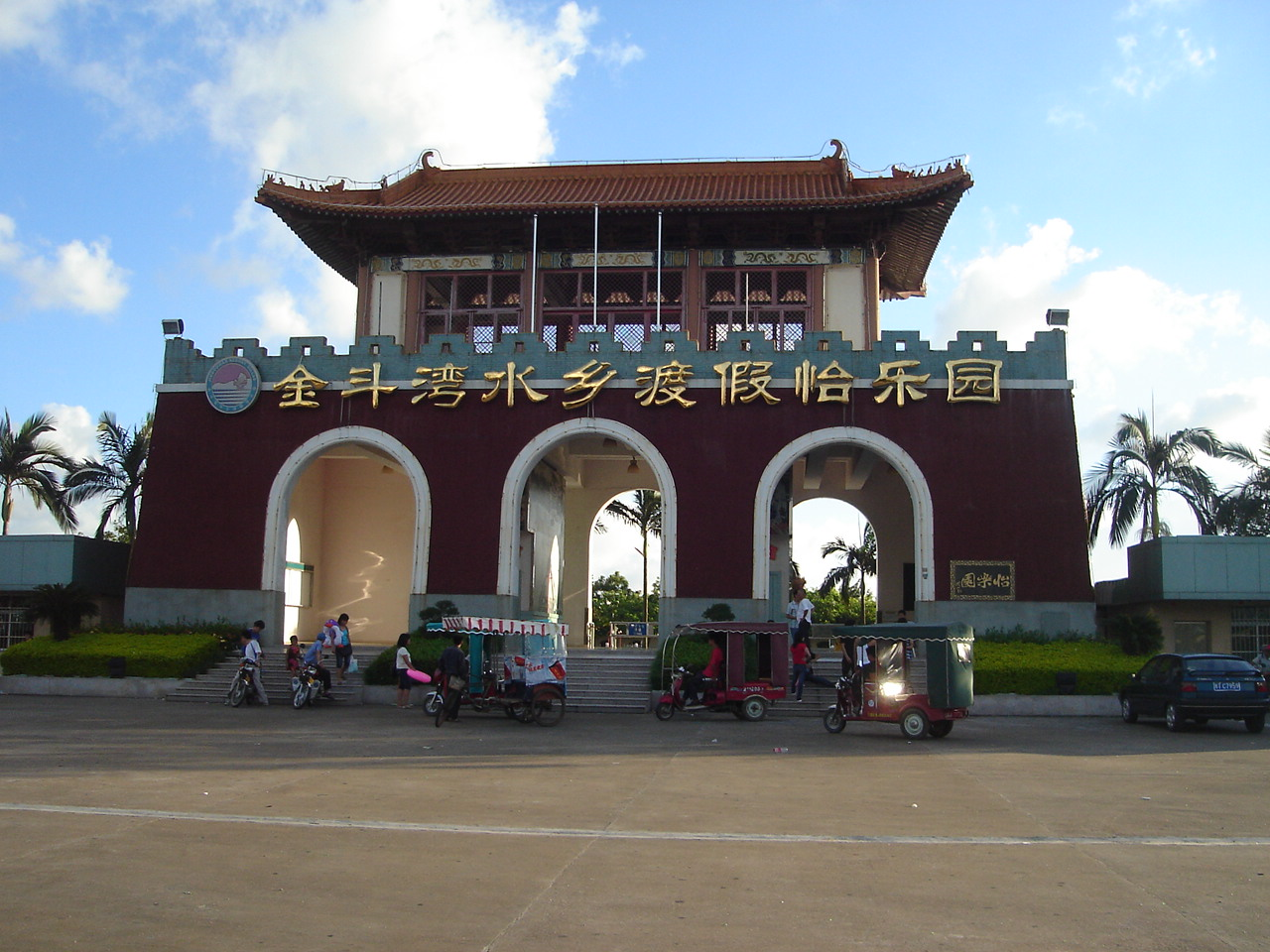 中山市坦洲镇金斗湾乐园